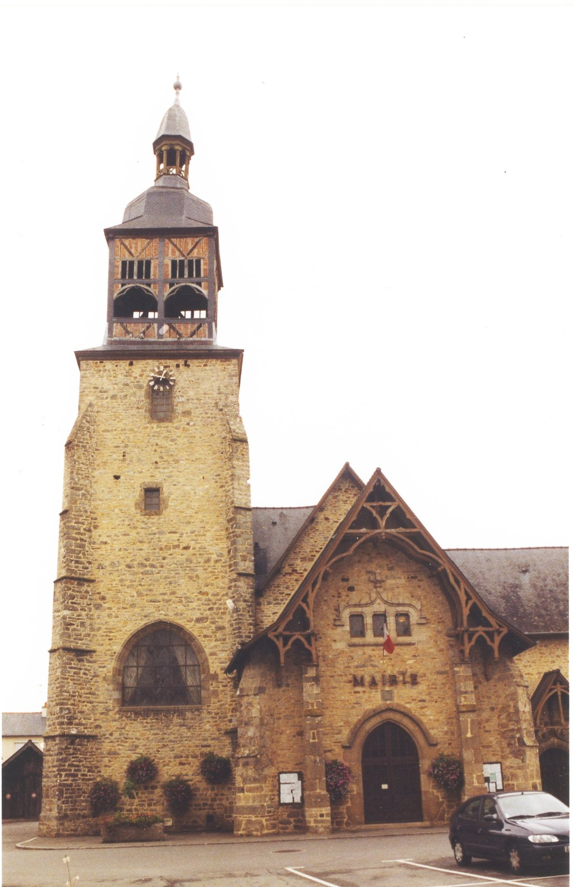 Mairie de Val d'Izé (Ille et Vilaine)